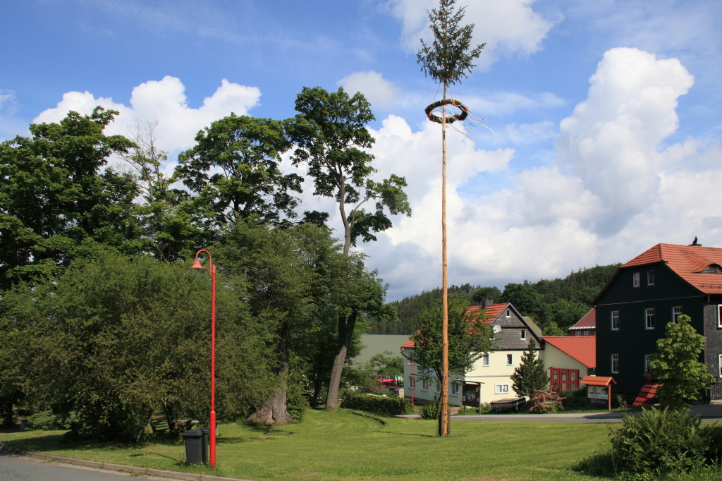 Wittgendorf, Saalfelder Höhe